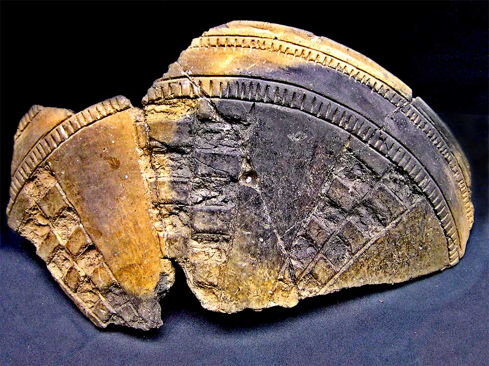 Cerámica decoración excisa procedente de la provincia de Valladolid (Bronce final, Cultura de Cogotas-I, 1 100-800 adC). Se conserva en el Museo de Valladolid, antes Museo Arqueológico de Valladolid